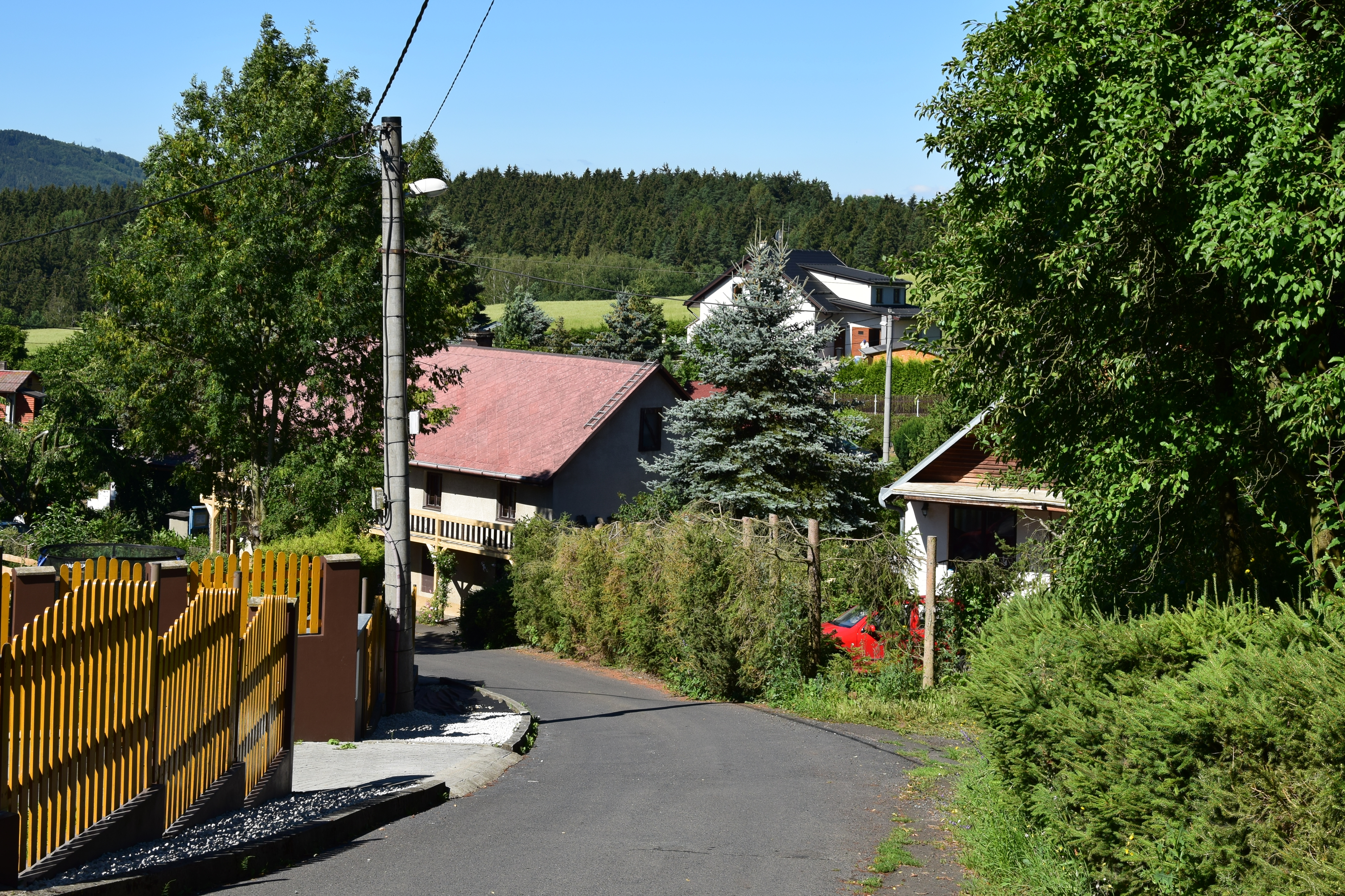 Pulovice – střed vesnice